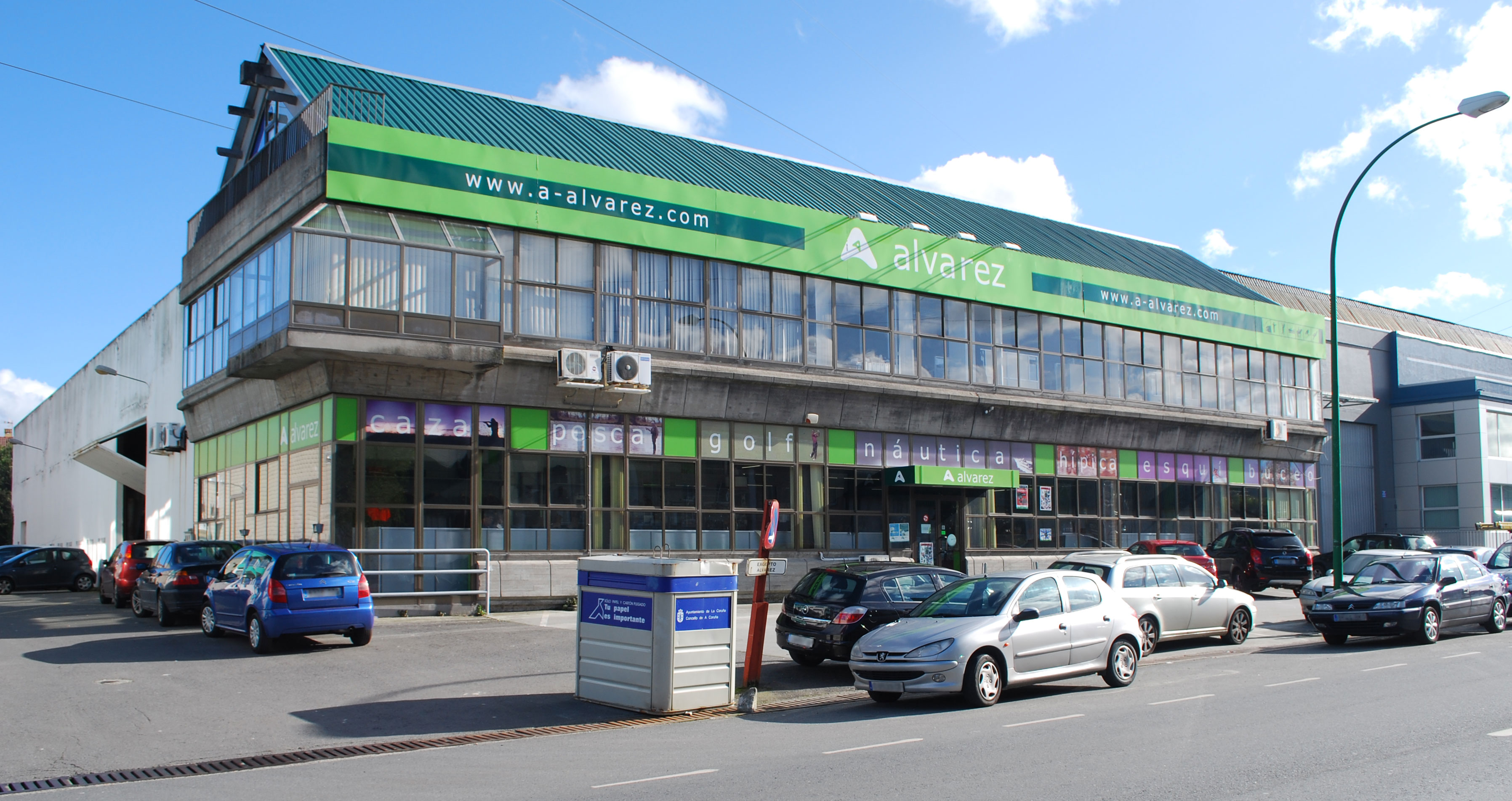 Armería Álvarez Pocomaco A Coruña Lugo Galiza Spain